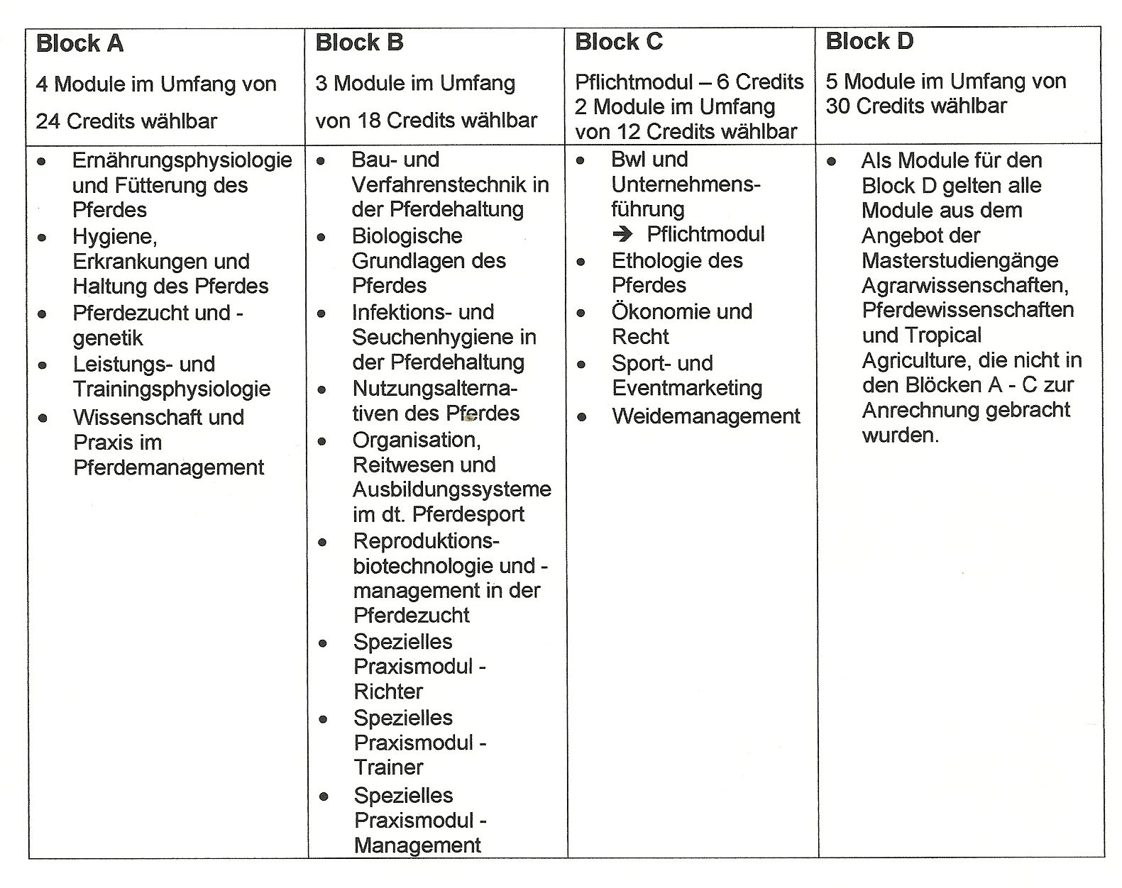 Modulplan Göttingen; Block A 4 Module im Umfang von 24 Credits wählbar Block B 3 Module im Umfang von 18 Crédits wählbar Block C Pflichtmodul - 6 Credits 2 Module Im Umfang von 12 Credits wählbar Block D 5 Module im Umfang von 30 Credits wählbar • Emährungsphysiologie und Fütterung des Pferdes • Hygiene, Erkrankungen und Haltung des Pferdes • Pferdezucht und -genetik • Leistungs- und T rainingsphysiologie • Wissenschaft und Praxis im Pferdemanagement • Bau- und Verfahrenstechnik in der Pferdehaltung • Biologische Grundlagen des Pferdes • Infektions- und Seuchenhygiene in der Pferdehaltung • Nutzungsaltema-tlven des Pferdes • Organisation, Reitwesen und Ausbildungssysteme im dt. Pferdesport • Reproduktionsbiotechnologie und -management in der Pferdezucht • Spezielles Praxismodul -Richter • Spezielles Praxismodul -Trainer • Spezielles Praxismodul -Management • Bwl und Untemehmens-führung Pflichtmodul • Ethologie des Pferdes • Ökonomie und Recht • Sport- und Eventmarketing • Weidemanagement • Als Module für den Block D gelten alle Module aus dem Angebot der Masterstudiengänge Agrarwissenschaften, Pferdewissenschaften und Tropical Agriculture, die nicht in den Blöcken A - C zur Anrechnung gebracht wurden.